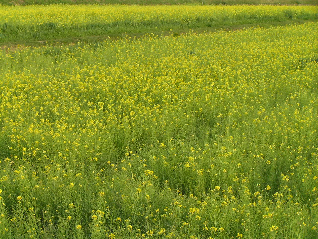 菜の花畑（兵庫県ひまわりの丘公園内）～photo by Autumn Snake 【おぉたむ すねィく探検隊】写真部門 担当 大原佳苗